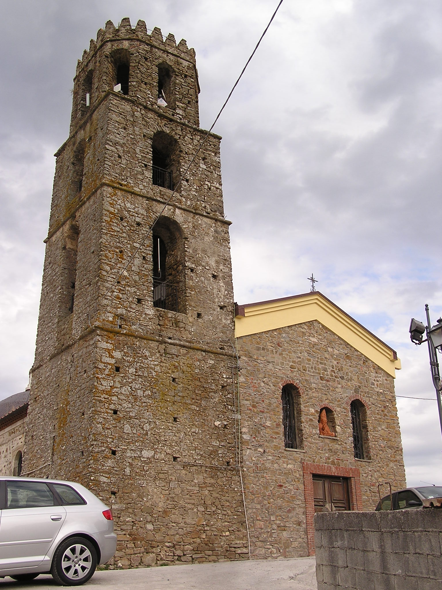 La chiesa di S.Nicola (XVI sec.) nel centro storico di Perito.